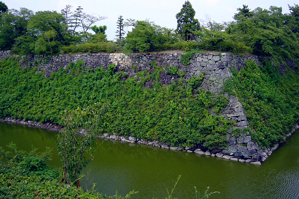 Stone fence of Koriyama Castle in Yamatokoriyama, Nara